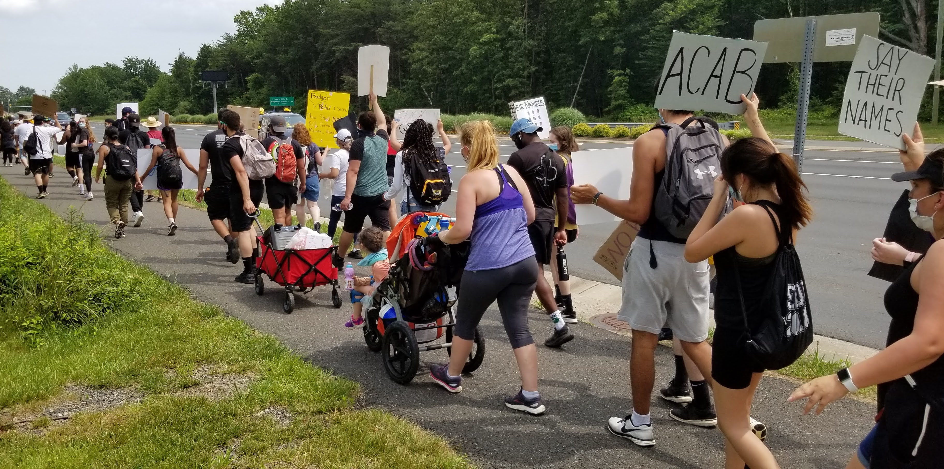 Manassas, Virginia.